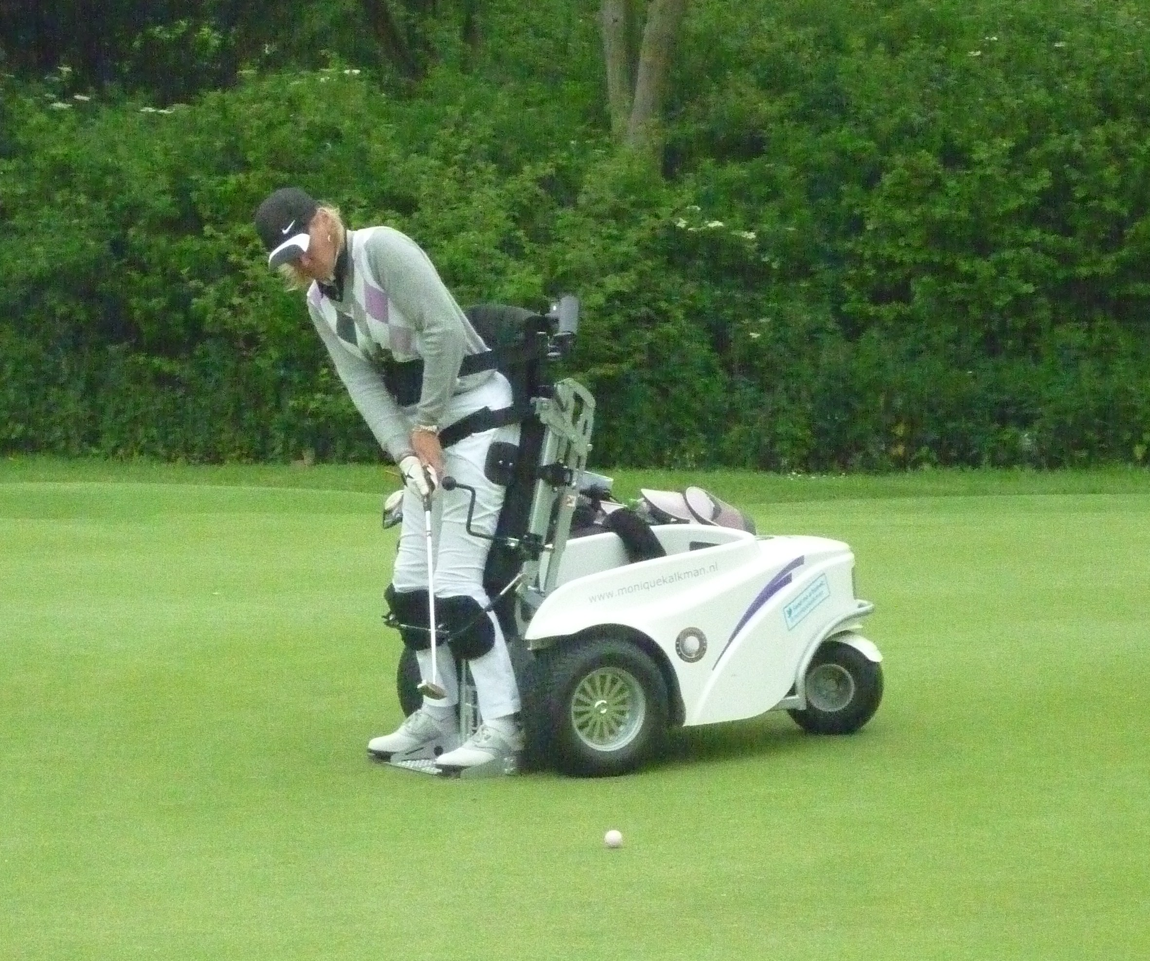 Monique Kalkman tijdens Pro-Am op Broekpolder